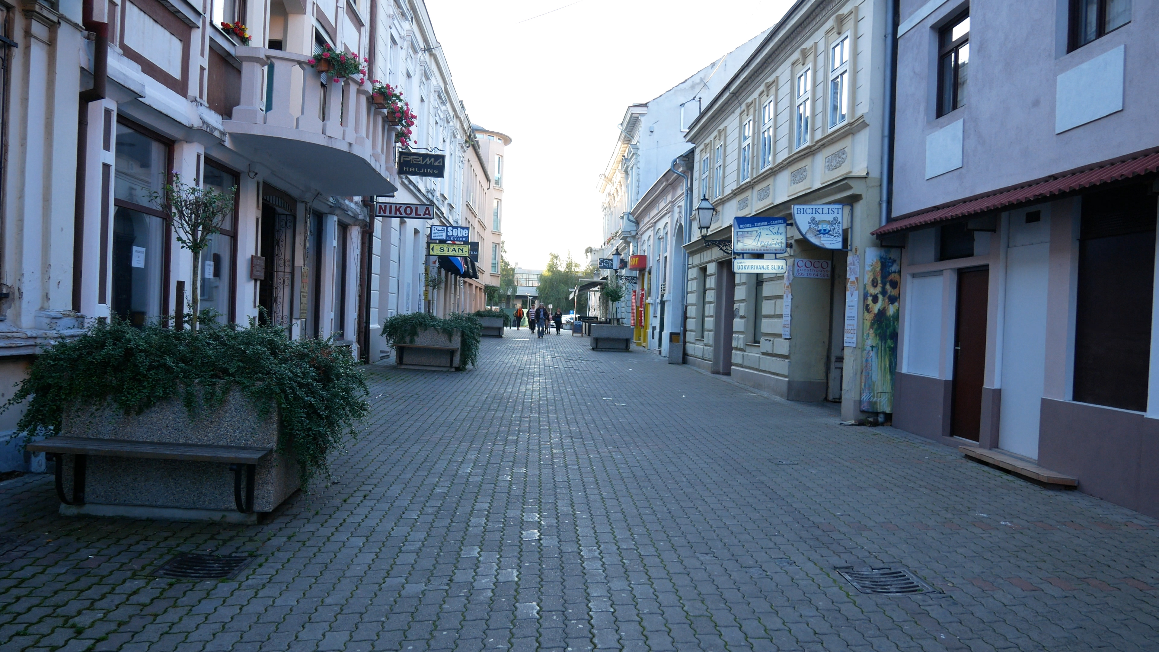 Dio povijesno urbane cjeline Slavonski Brod